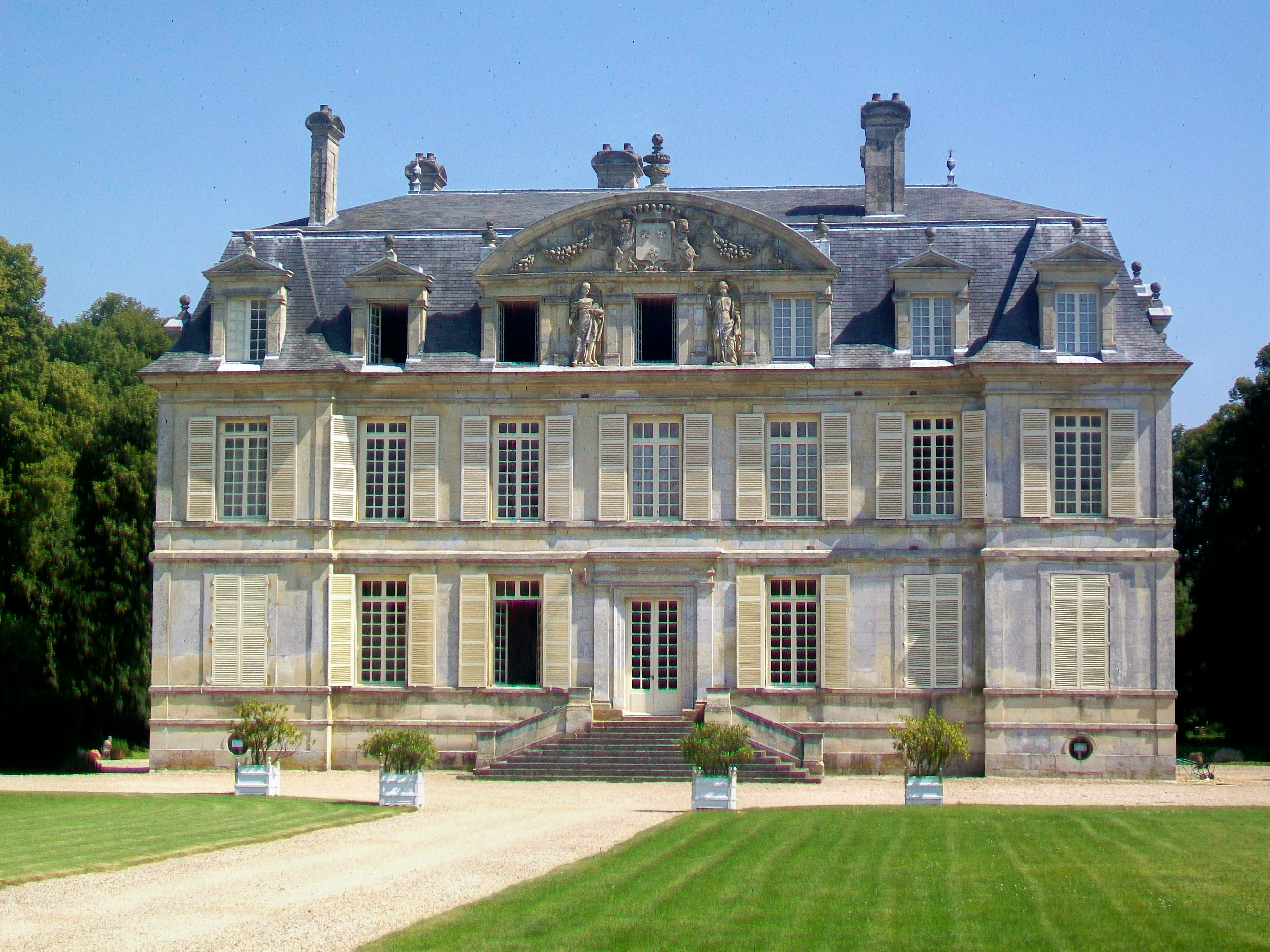 Façade principale nord-ouest, la seule visible depuis le domaine public.